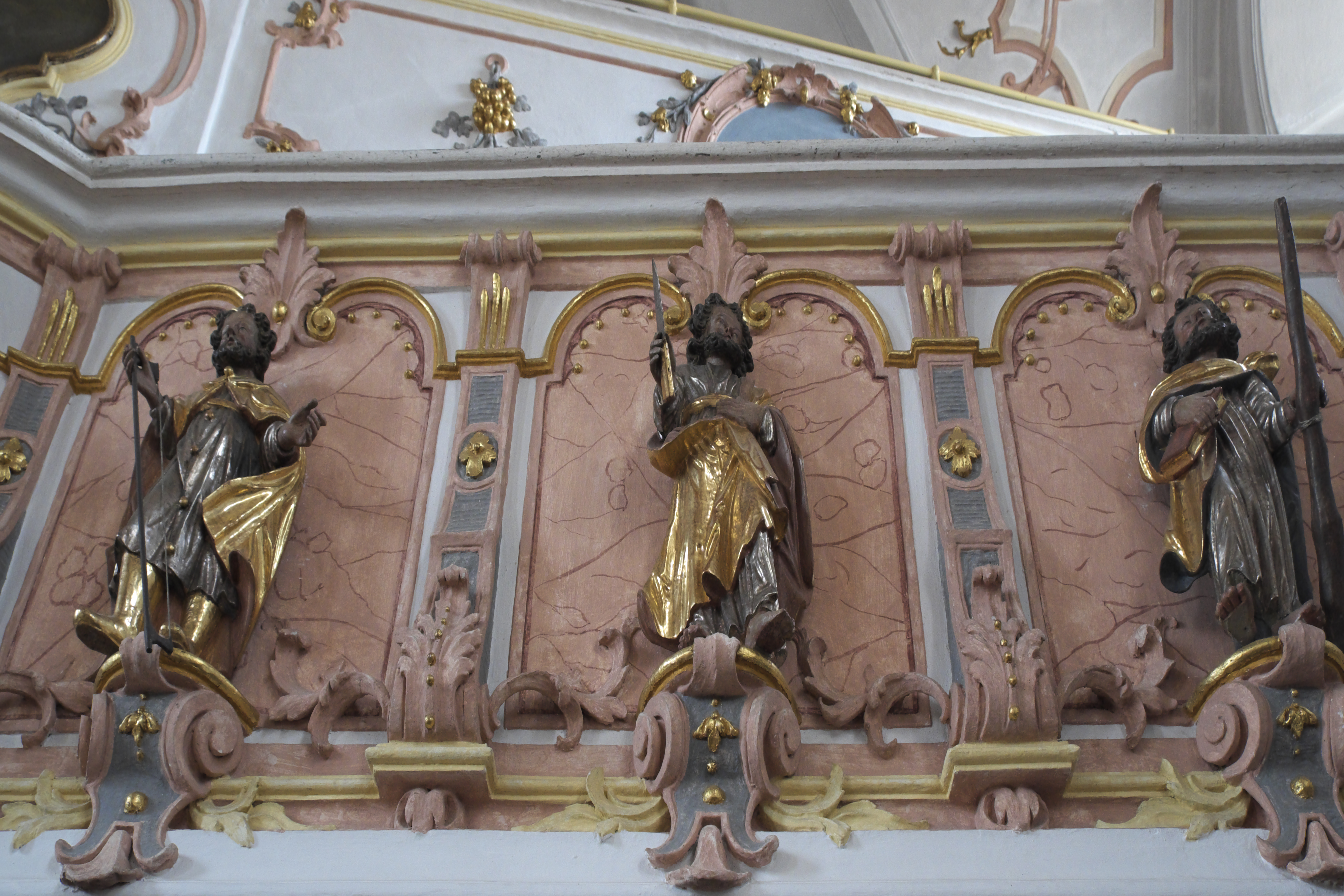 Katholische Pfarrkirche Mariä Himmelfahrt in Walleshausen, einem Ortsteil von Geltendorf im Landkreis Landsberg am Lech (Oberbayern/Bayern), Apostelfiguren an der Emporenbrüstung, von Heinrich Hagn, um 1690/70